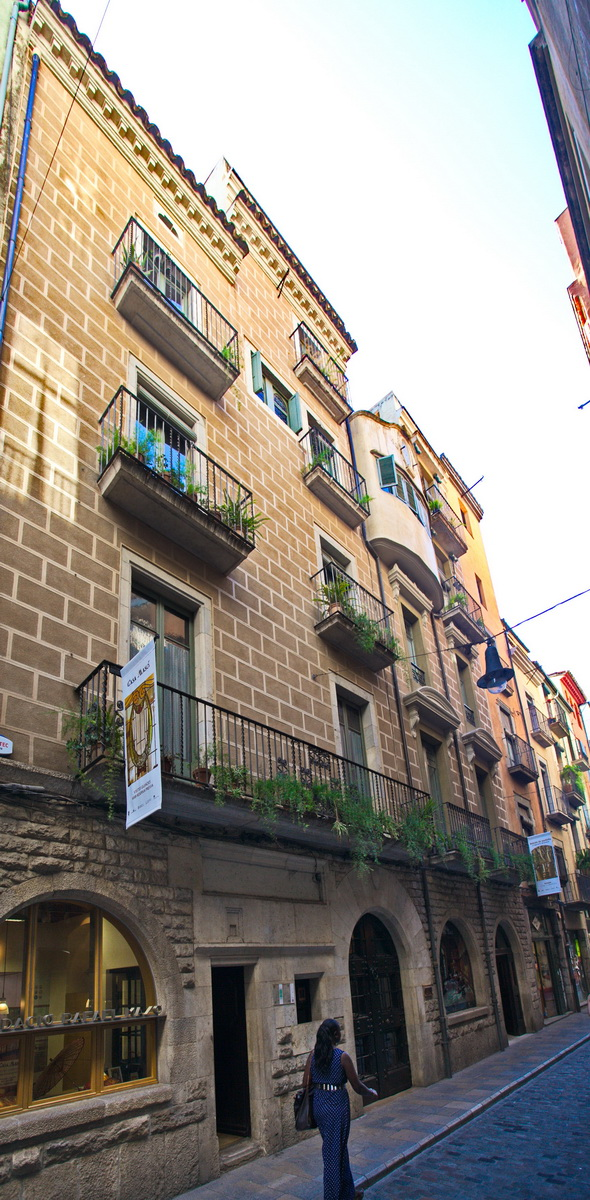 Casa Masó (Girona)